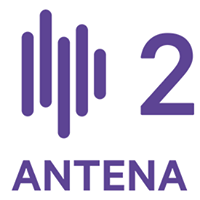 Logo da nova Antena 2